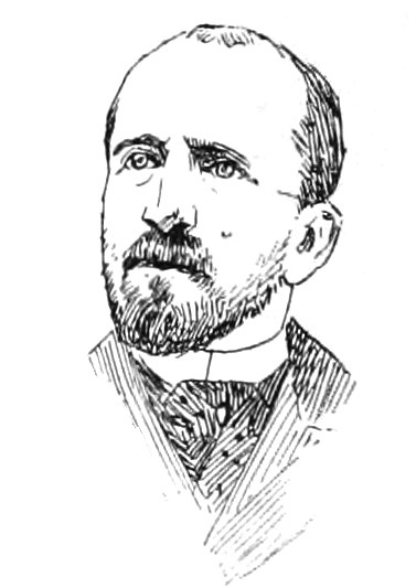 "La Nouvelle Chambre" : "Gauthier (de Clagny)".